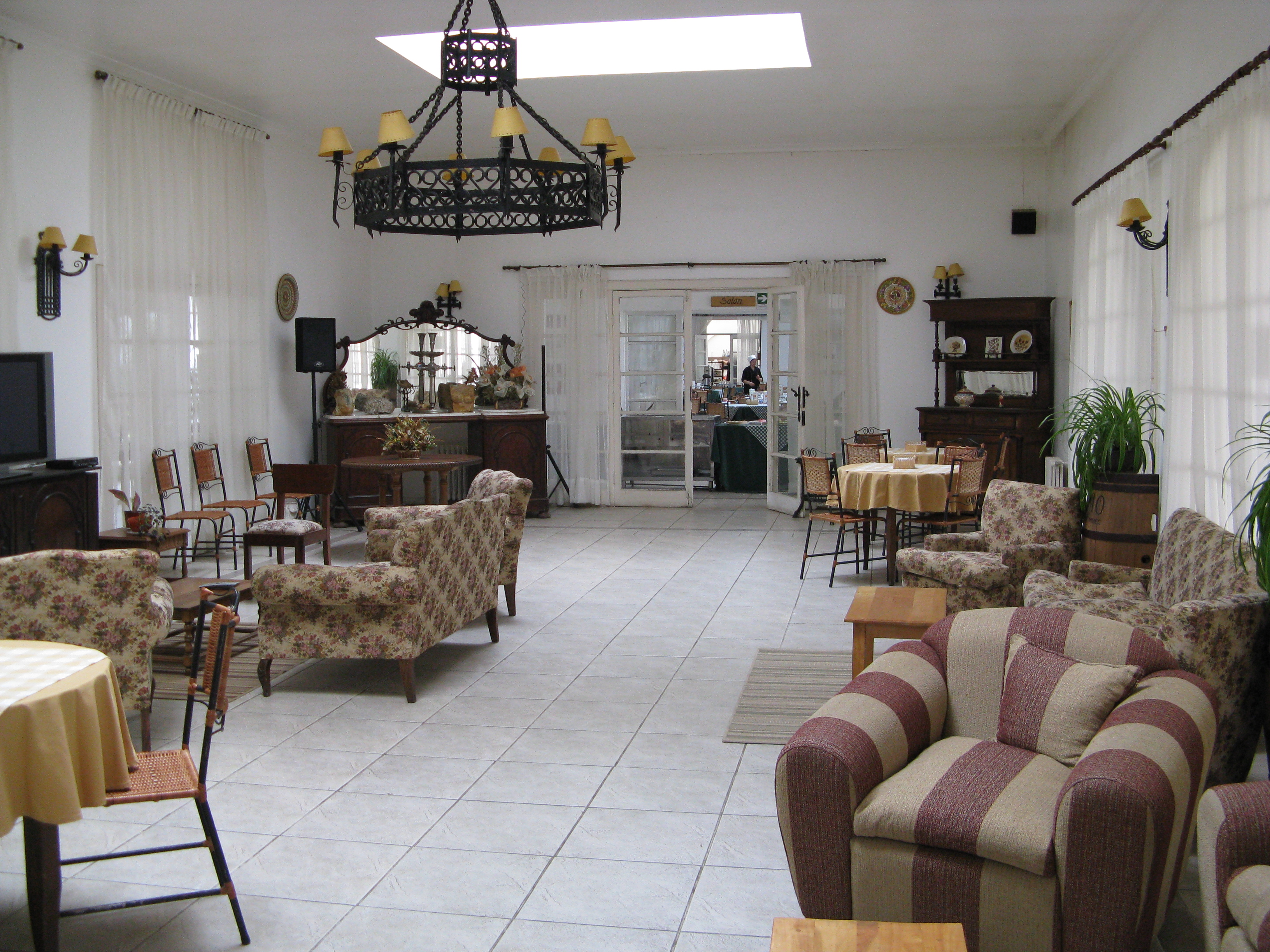 Vista de los interiores del bar de Termas de Panimávida, comuna de Colbún, Provincia de Linares, Región del Maule, Chile.